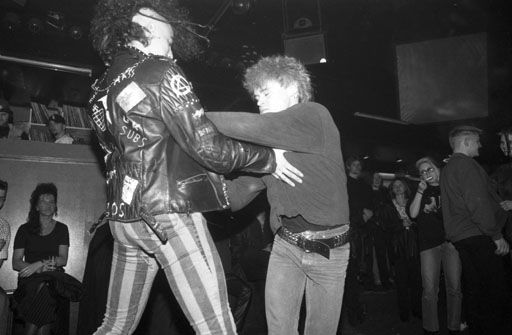 Punker beim Slamdance im Tanzcafe LiBella, Altenmarkt an der Alz, Februar 1997. Veröffentlicht in: Münchner Stadtmagazin, Heft 5/1994, Seite 44: Wir sind eine große Familie